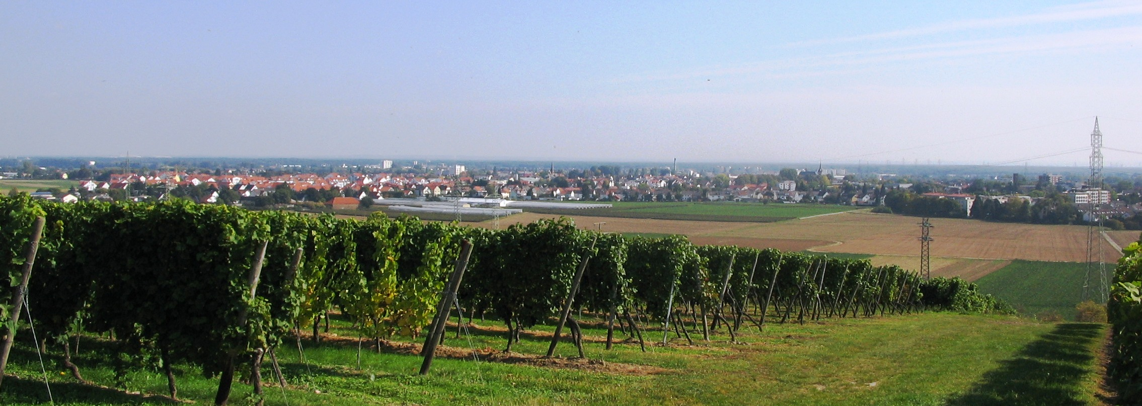 Blick von der Flörsheimer Warte in den Wickerer Weinbergen nach Flörsheim am Main